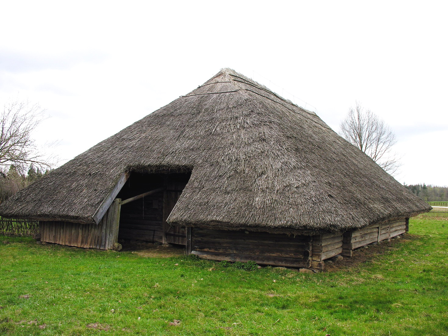 Klojimas